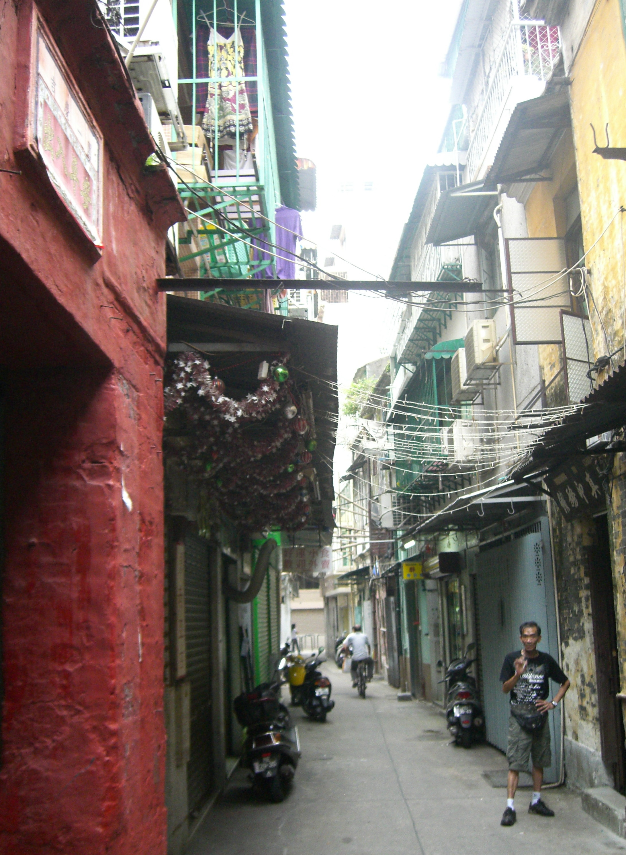 Travessa dos Becos